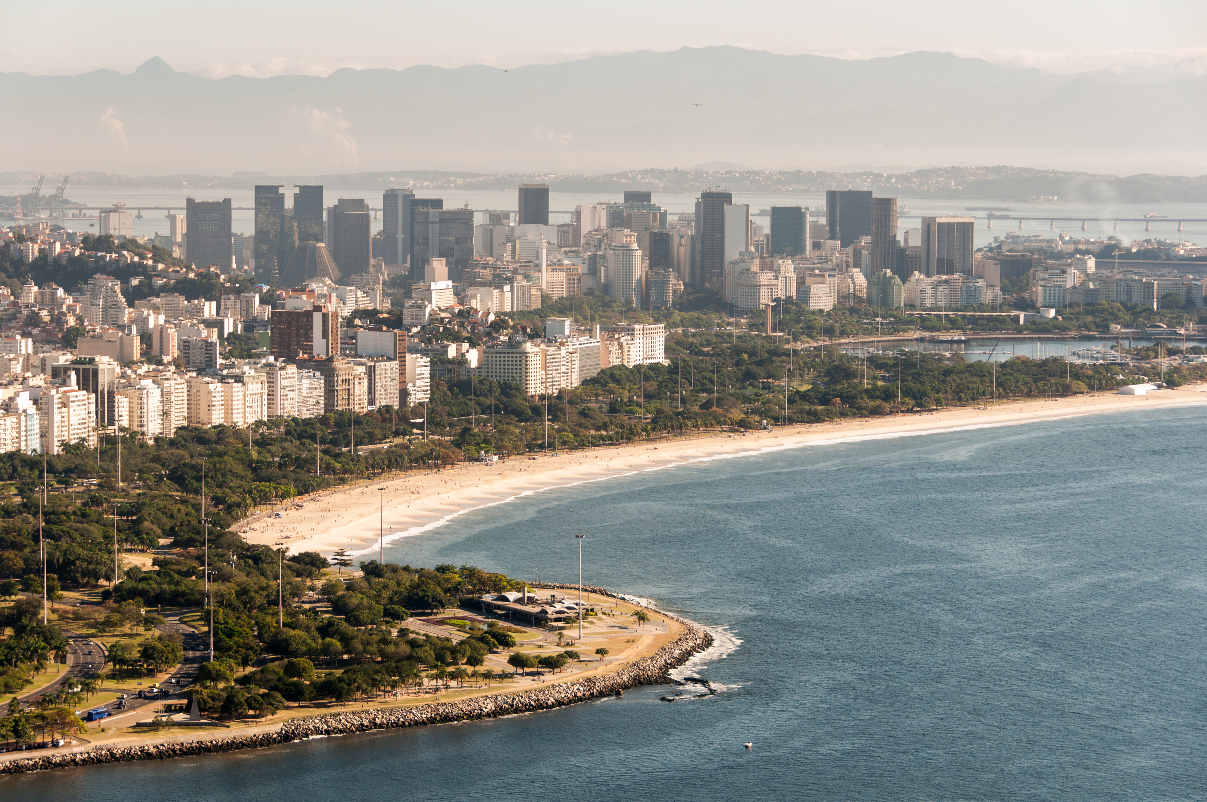 Aterro do Flamengo